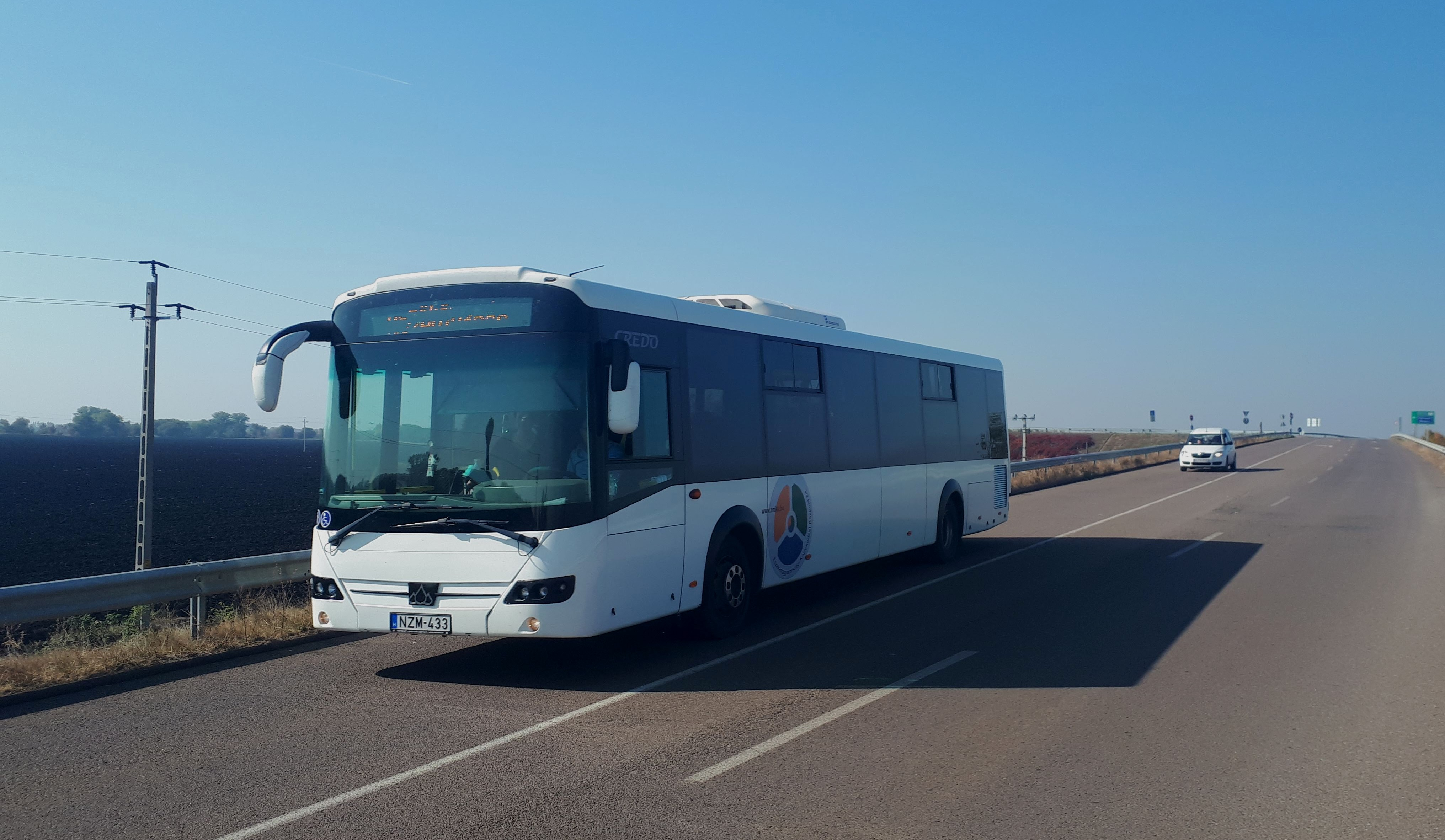 Az ÉMKK NZM-433 rendszámú Credo Econell 12 típusú busza az M3-as autópálya mezőnagymihályi felüljárójáról lefelé, a 4008-as helyközi járaton.